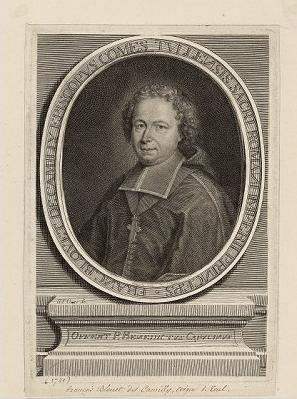 François Blouet de Camilly (1664-1723), évêque de Toul puis archevêque de Tours